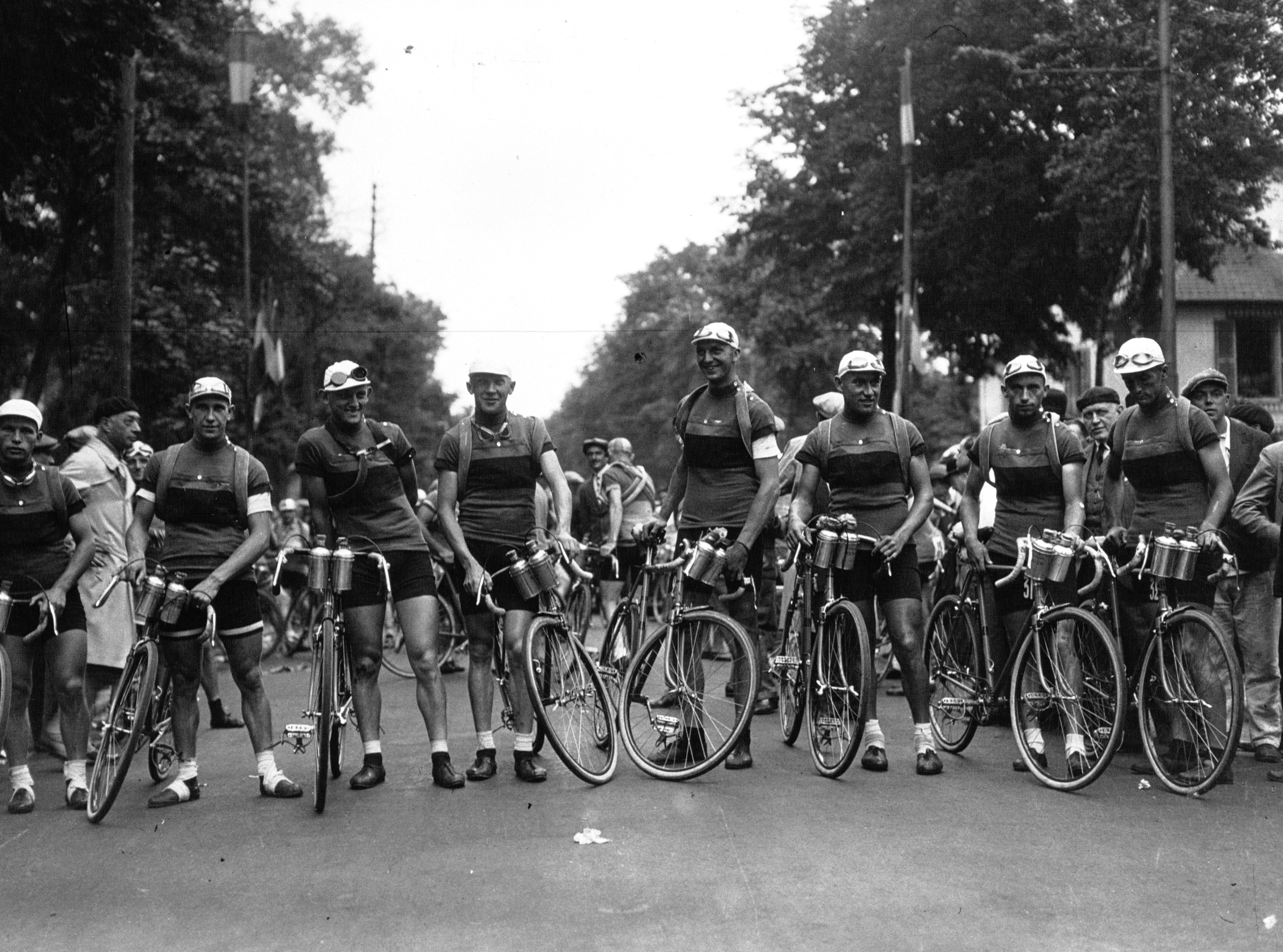 Das deutsche Team bei der Tour de France 1932. Von rechts nach links: Willy Kutzbach, Georg Umbenhauer, Max Bulla, Oskar Thierbach, Herbert Sieronski, Ludwig Geyer, Kurt Stöpel, Rudolf Risch